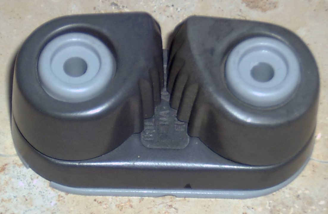 Curryklemme (HOLT ALLEN HA 77)